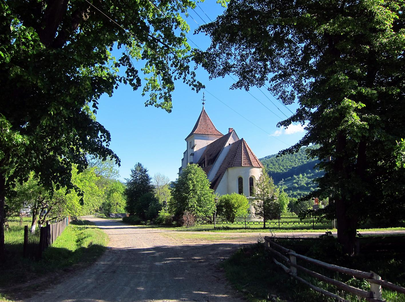 Костел. Споруджений в 1938р. с. Майдан, Львівська обл. Дрогобицький р-н.